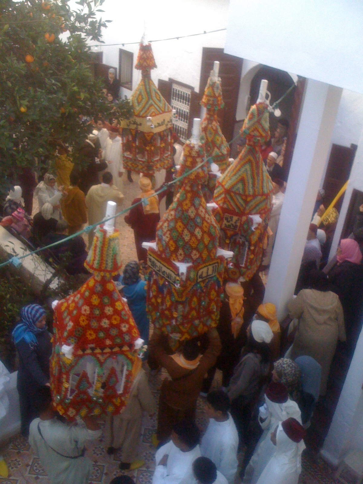 Procession des Cierges de sidi abdellah benhassoun.